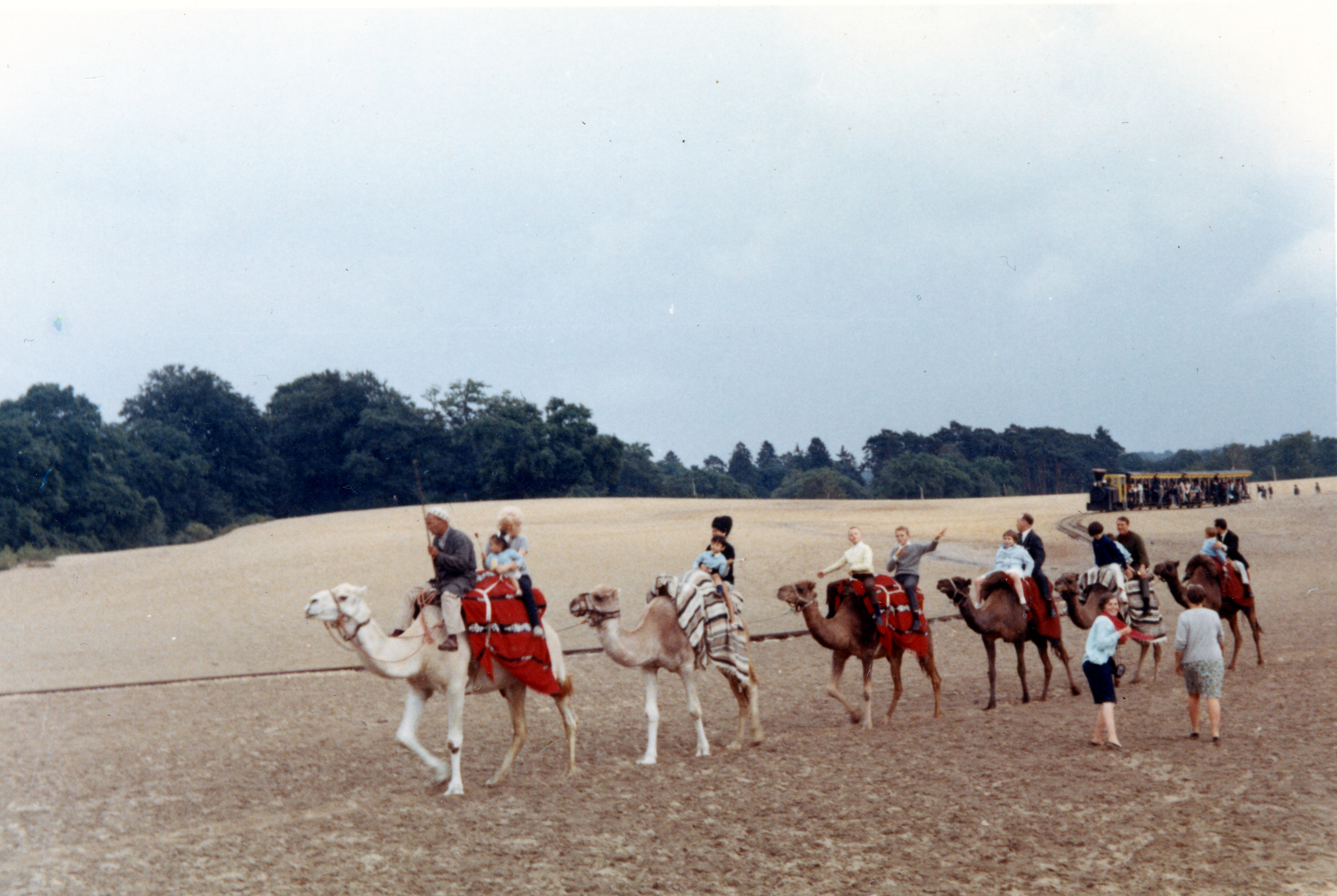 Photo restaurée promenade en chameaux à La Mer De Sable en 1966